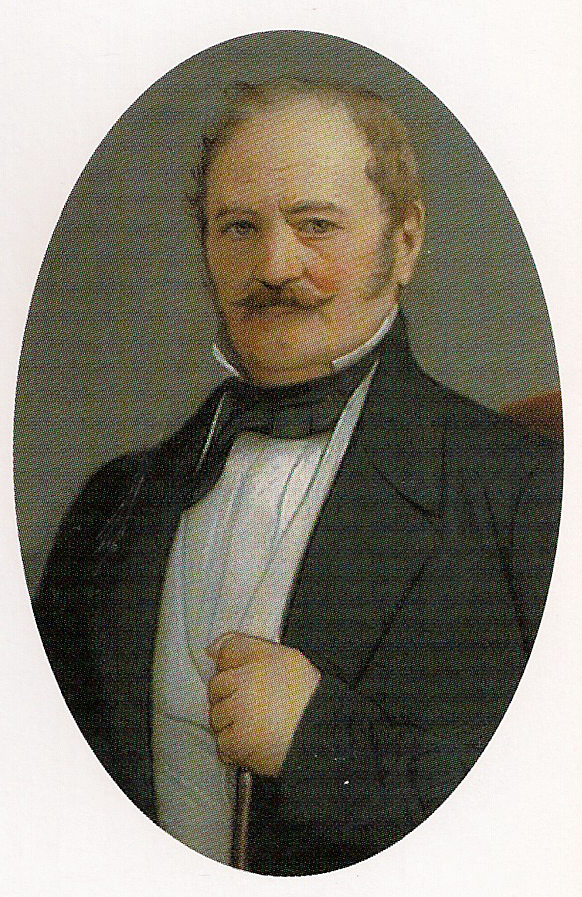 Ramón Freire Serrano (Santiago, 27 de noviembre de 1787 - 9 de diciembre de 1851) fue un militar y dirigente chileno que combatió durante la guerra de independencia de su país, hasta alcanzar el grado de Capitán General. Se desempeñó en diversas oportunidades en la primera magistratura, con los cargos de Director Supremo y Presidente de Chile. En el ejercicio de su cargo tuvo que enfrentar a las diferentes facciones que intentaban prevalecer en la naciente república, siendo finalmente derrotado por el partido dirigido por Diego Portales. Después de un largo período de exilio en la Polinesia, regresó a su nación para vivir sus últimos años.